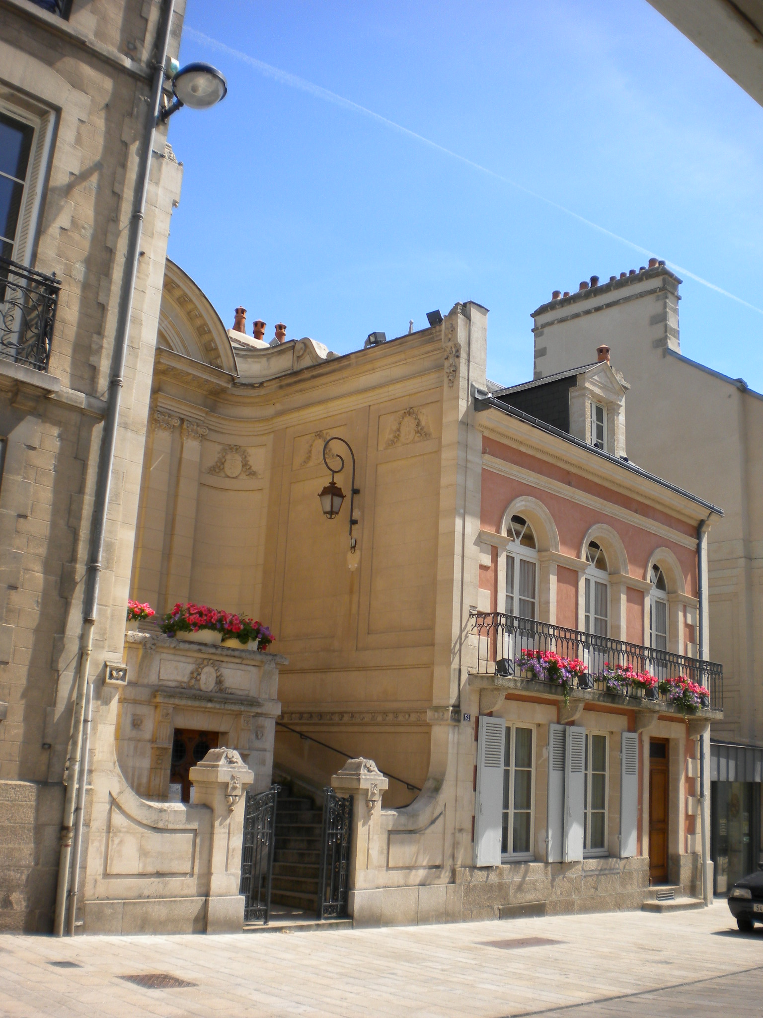 Alençon, Maison natale de sainte Thérèse de l'enfant-Jésus et chapelle